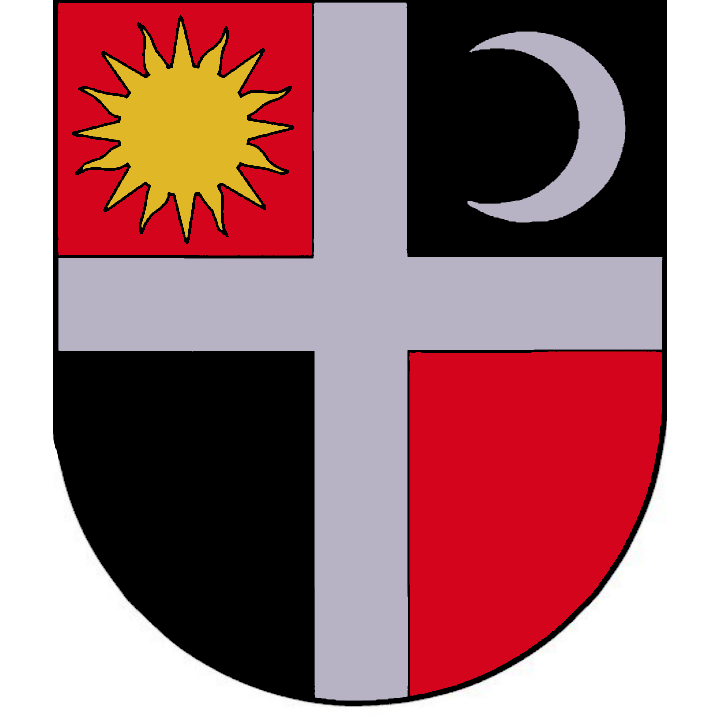 A csángó nép címere